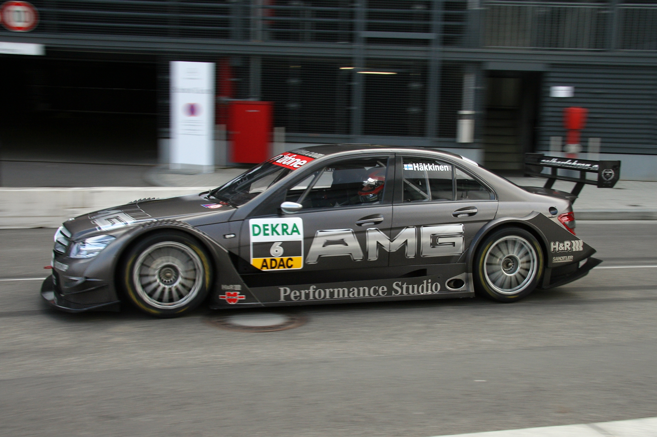 DTM car Mercedes-Benz AMG 2007 (C-Class, W204), Mika Häkkinen (driver)